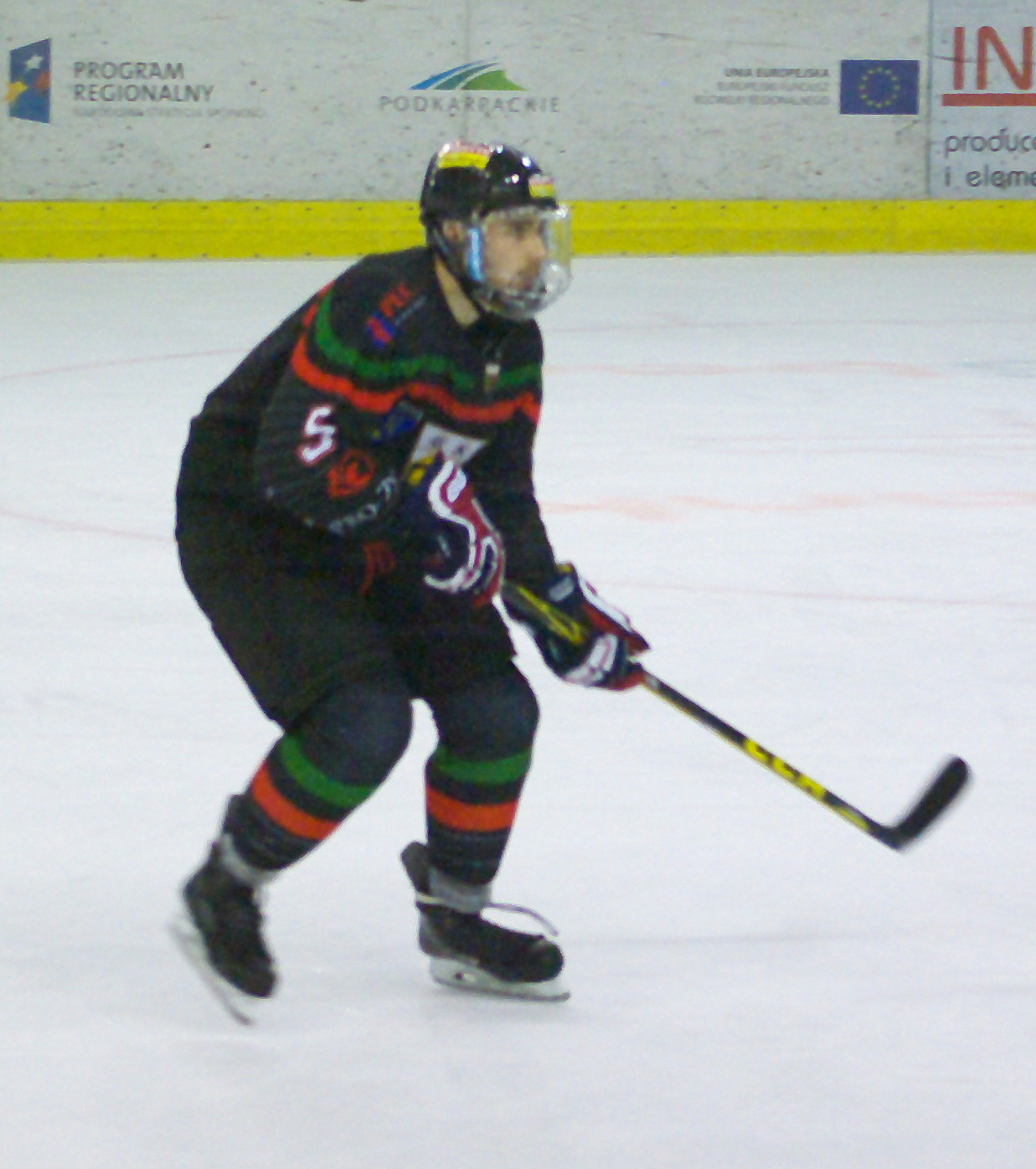 Filip Komorski w barwach GKS Tychy w meczu przeciw STS Sanok (Arena Sanok, 22 grudnia 2015)